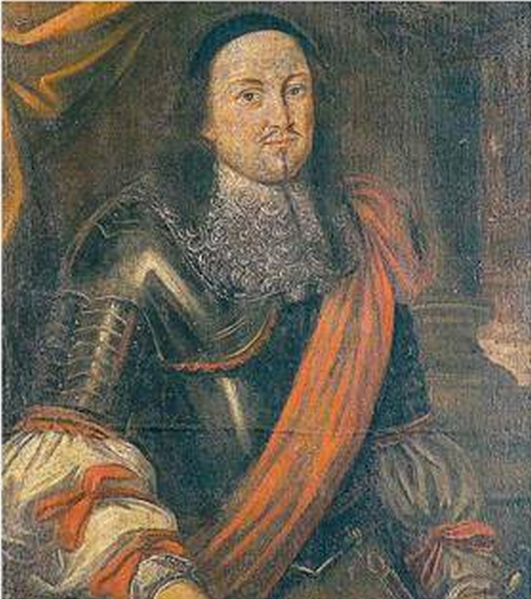 Raro Ritratto di Ferrante III Gonzaga, duca di Guastalla